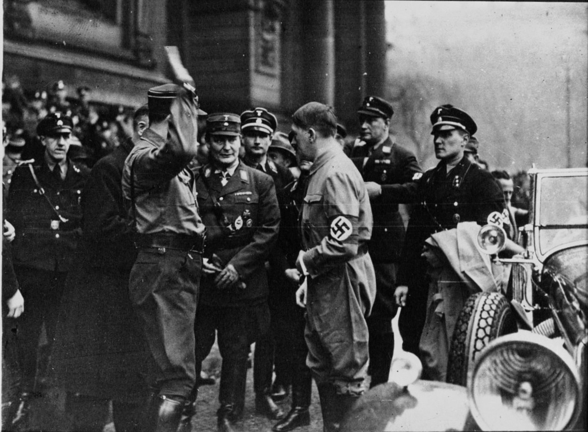 Hitler y Georing en la catedral protestante de Berlín, en el funeral de Miakovsky y Lauritz, 1933.